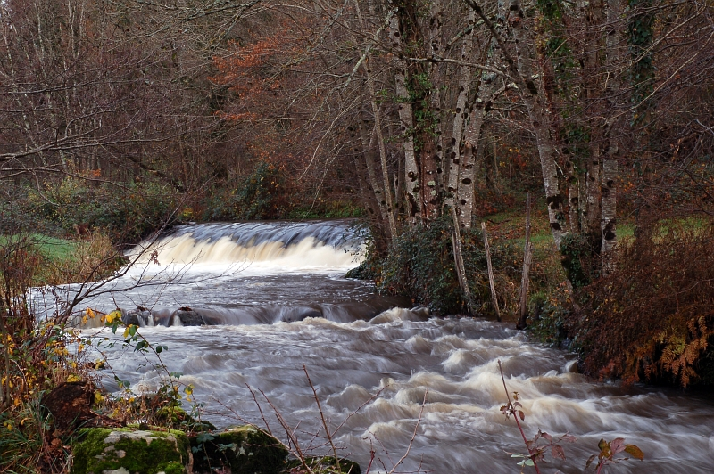 Rivière la Semme dans la commune de Droux, écluse du moulin des Prades